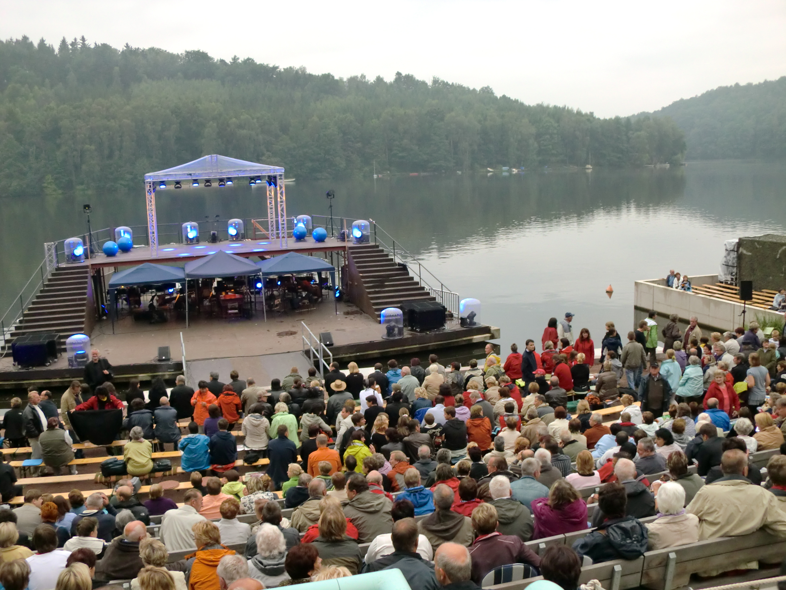 Die Seebühne in der Talsperre Kriebstein zur Aufführung "Sinfonie der Elemente"